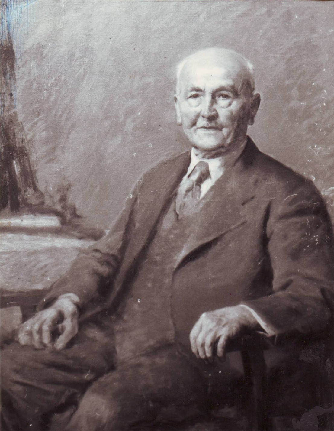 Dr.Zdeněk Wirth - portrét od ak.mal.Františka Antonína Jelínka